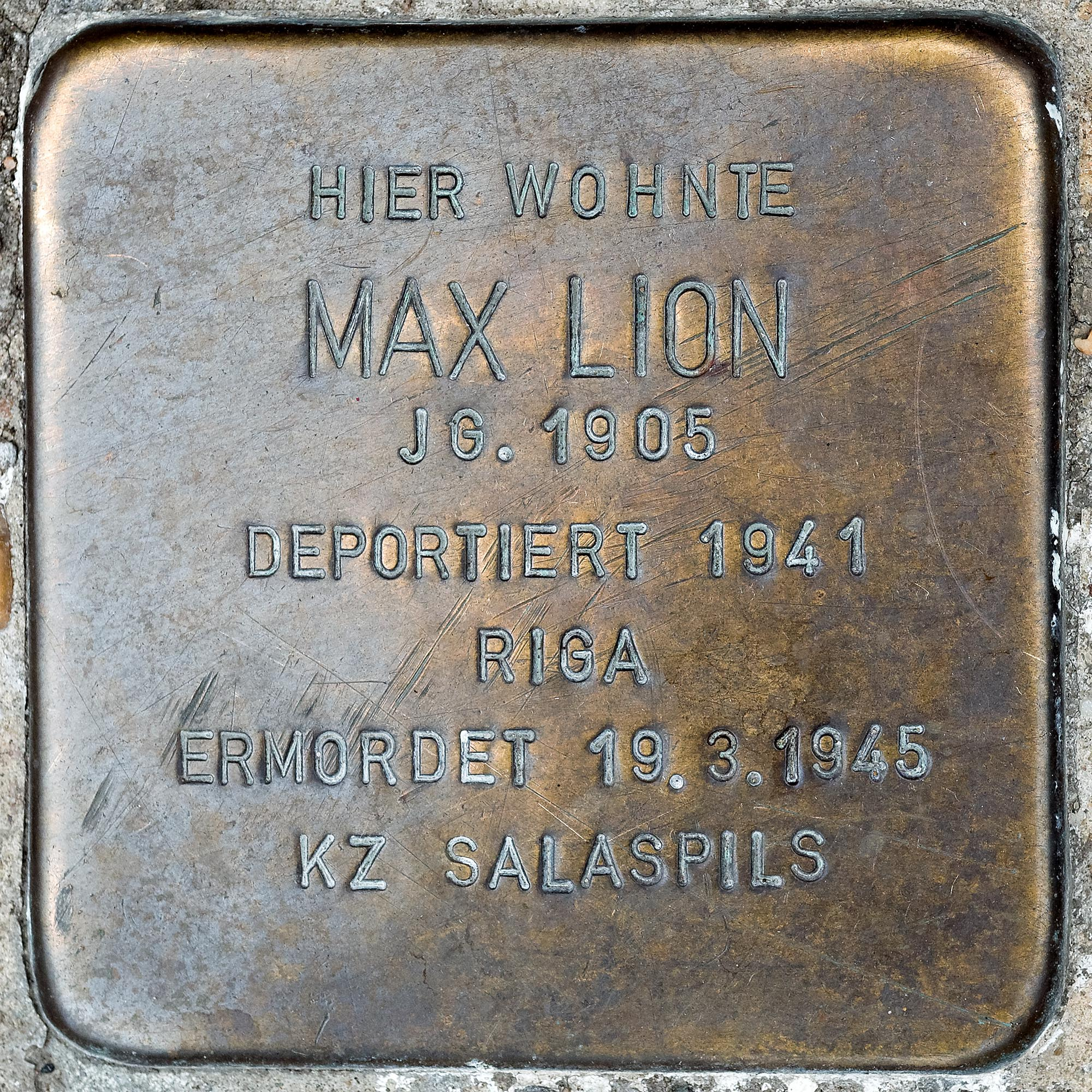 Stolperstein Lion, Max